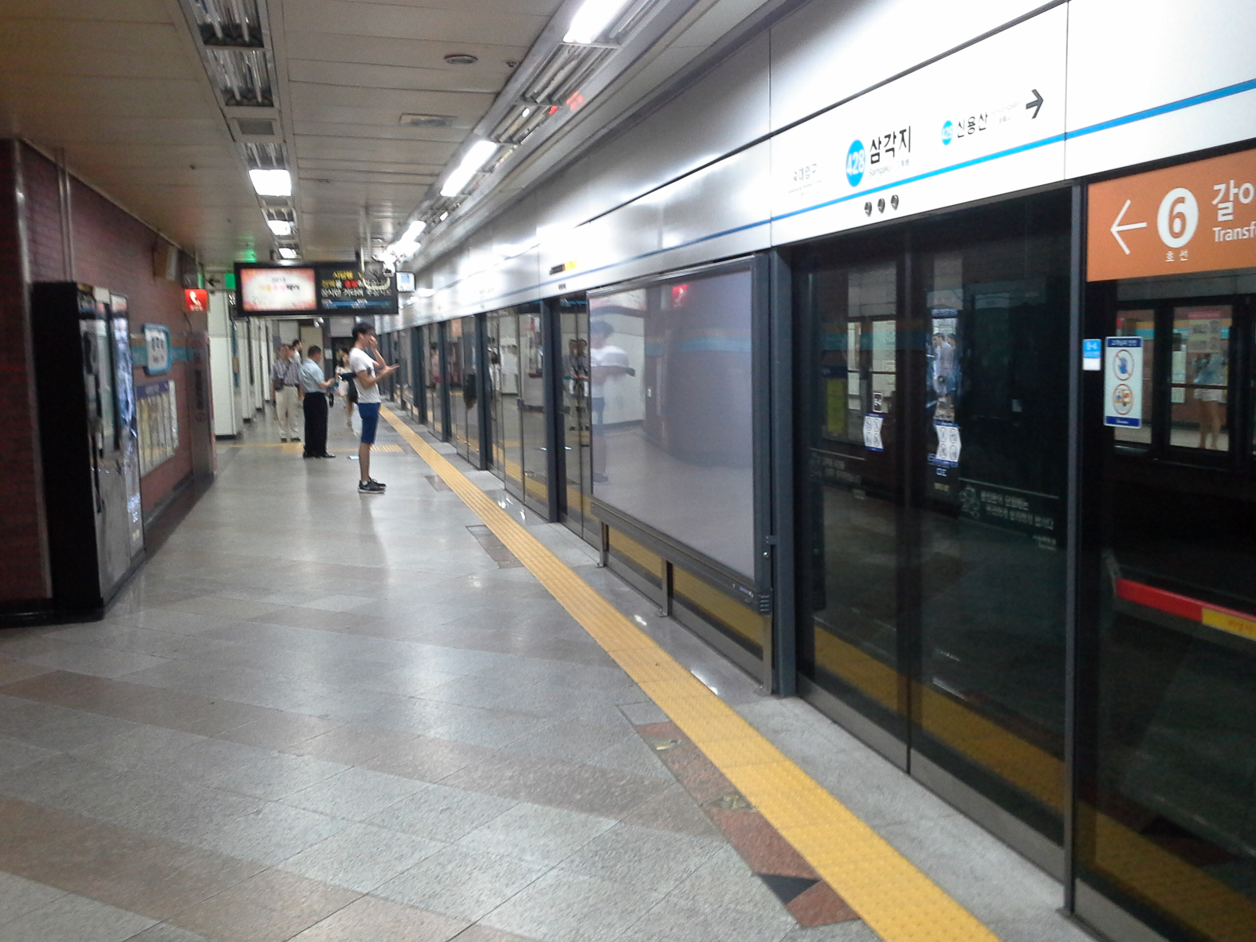 4호선 삼각지역 승강장